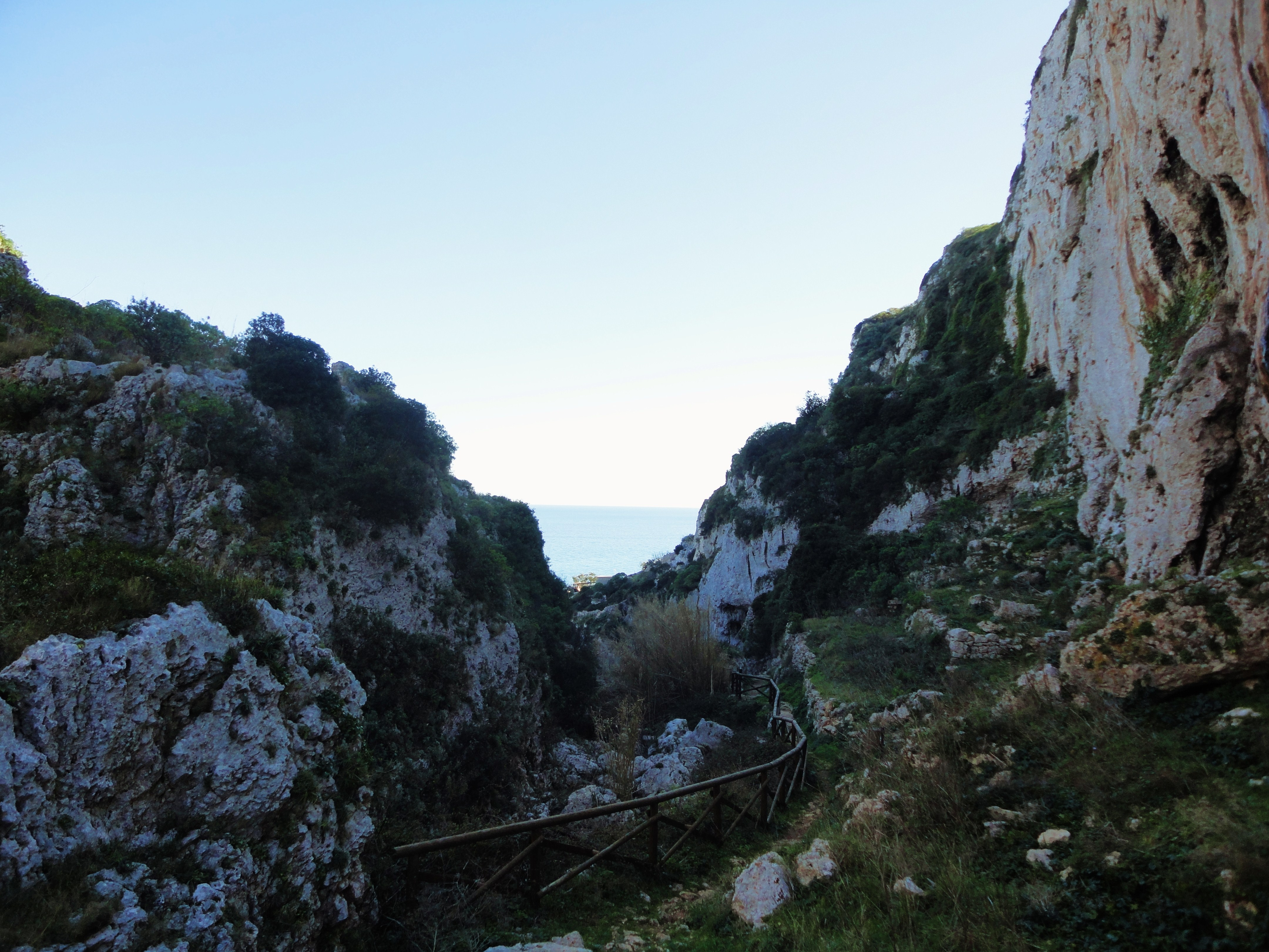 Canalone del Ciolo Gagliano del Capo